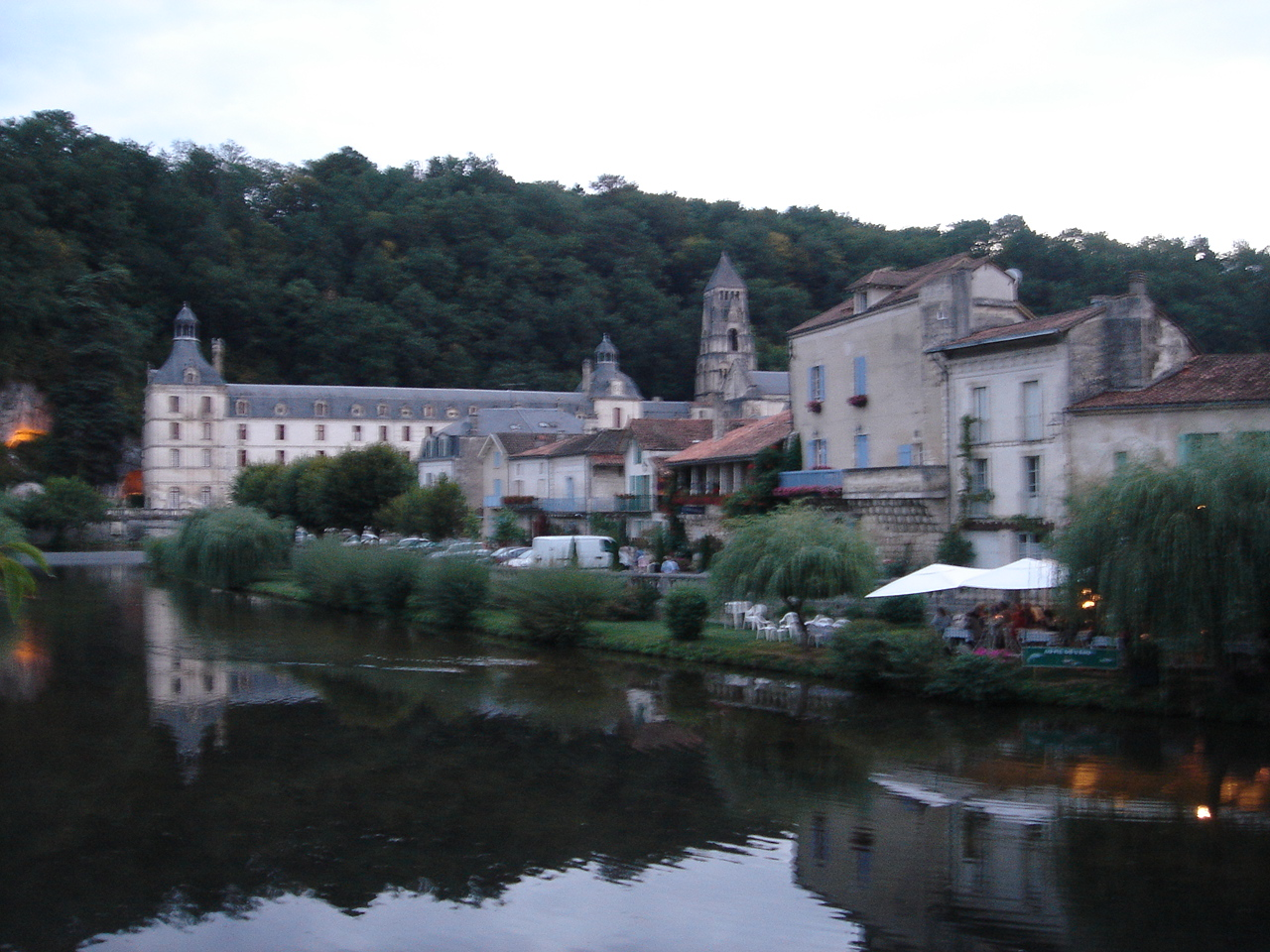 Die Stadt Brantôme im Périgord Vert, Dordogne (24), Frankreich. Blick von einer Brücke über die Dronne auf Altstadt und Kloster.